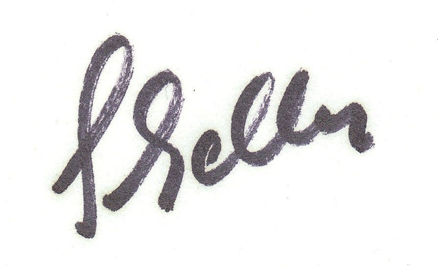 Autogramm des ehem. Bundesliga-Spielers von 1977